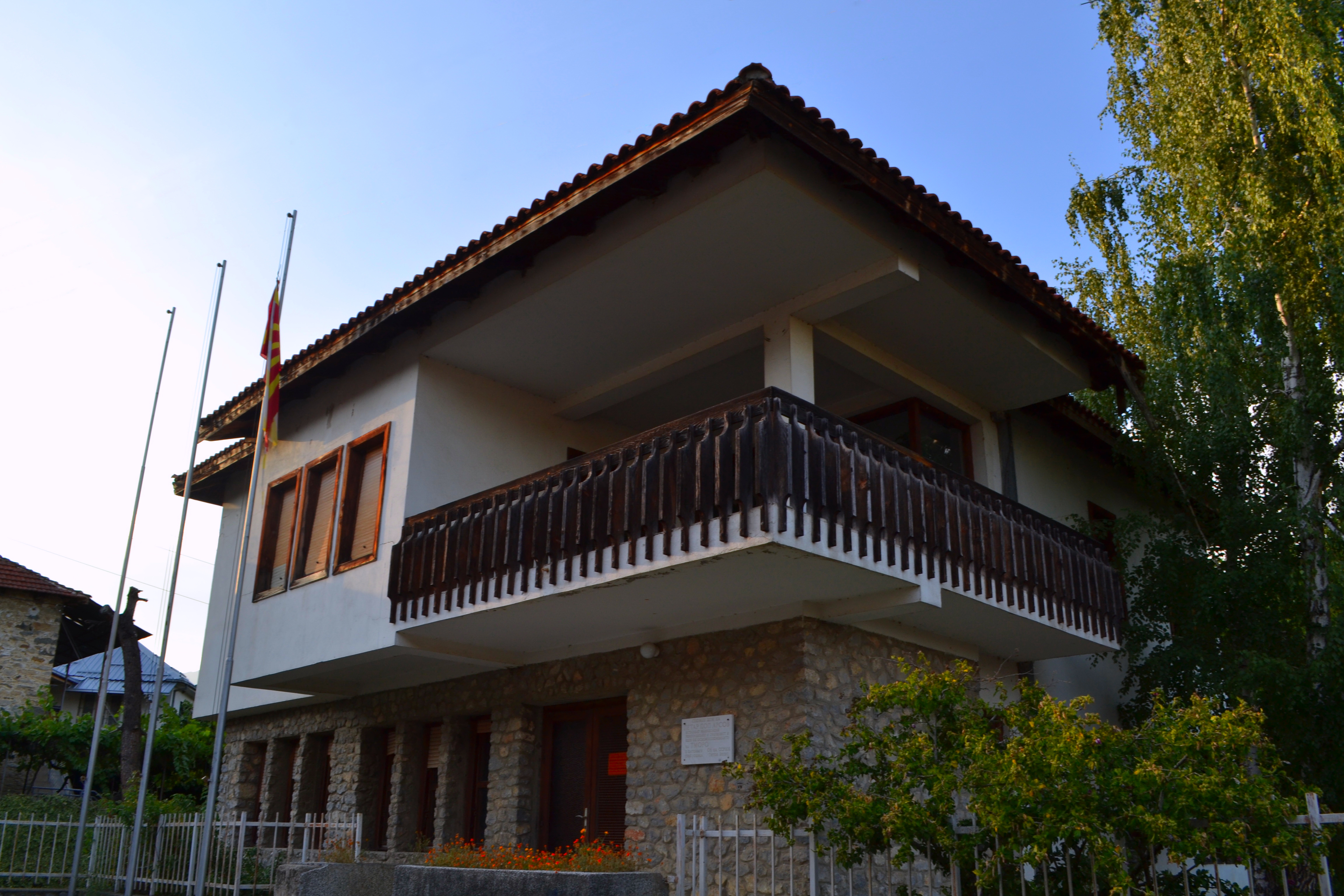 Куќата на Петар Поп Арсов - еден од основоположниците на Македонската револуционерна организација. Ова е фотографија на споменик на културата во Македонија со типски код: Ова е фотографија на споменик на културата во Македонија со типски код: B07This is a a photo of a cultural monument in North Macedonia with type id: B07 This is a a photo of a cultural monument in North Macedonia with type id: Ова е фотографија на споменик на културата во Македонија со типски код: B07This is a a photo of a cultural monument in North Macedonia with type id: B07